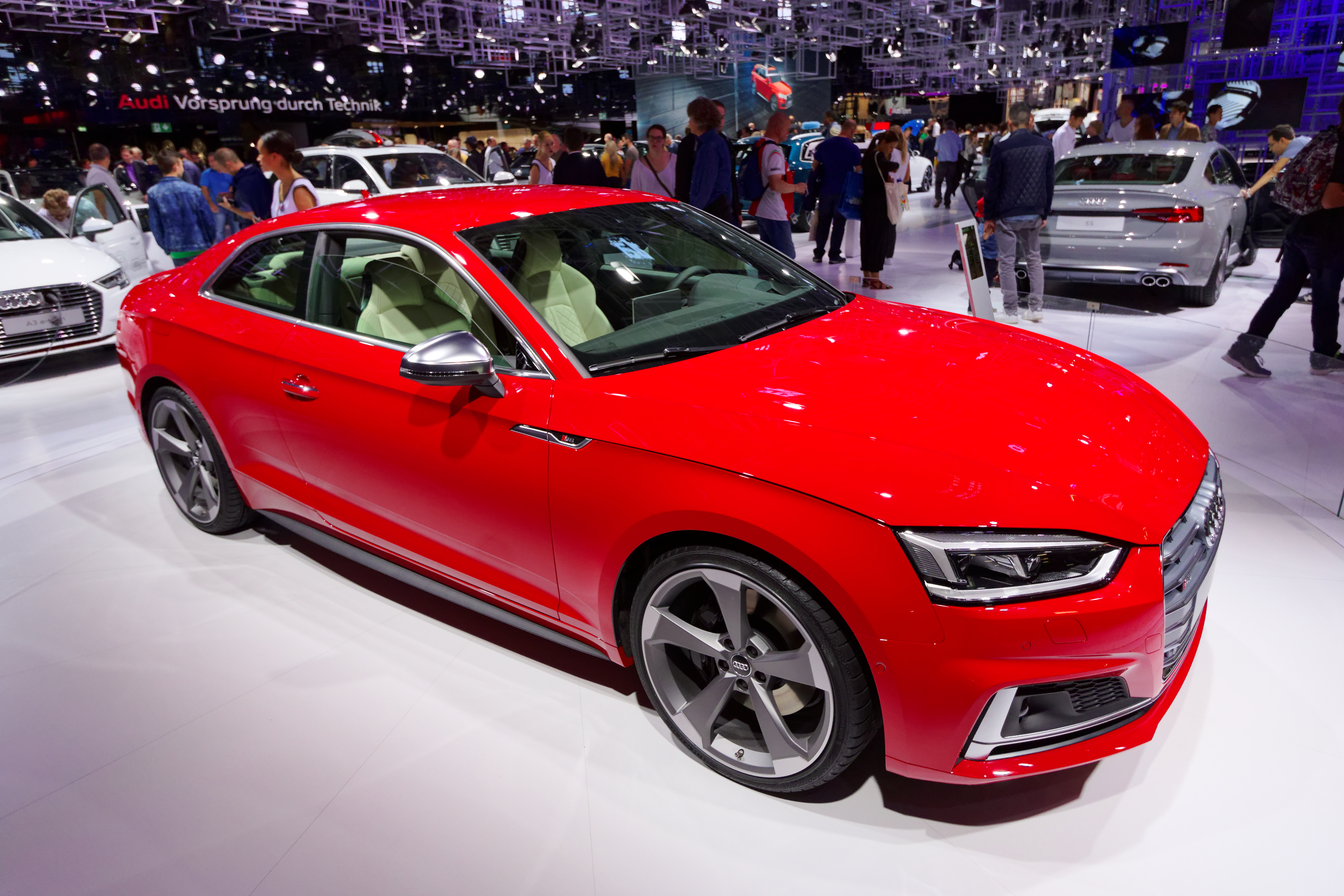 Une Audi S5 présentée lors du mondial de l'automobile de Paris 2016.